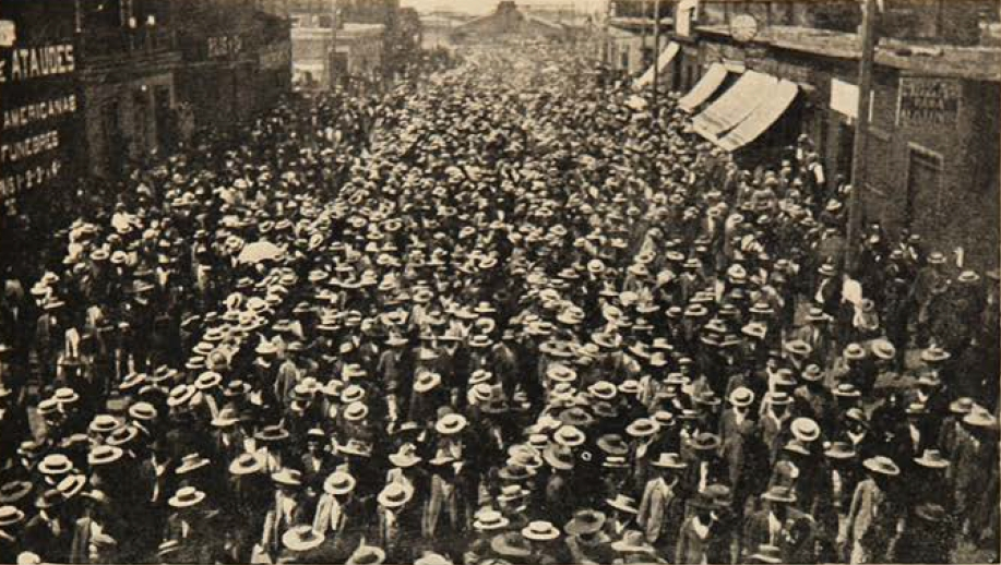 "Gran desfile de 2.500 trabajadores que llegan de la pampa salitrera a incrementar el movimiento" que terminaria en La Matanza de la Escuela Santa María de Iquique fue una masacre cometida en Chile el 21 de diciembre de 1907. En estos eventos fueron asesinados un número indeterminado de trabajadores del salitre de diversas nacionalidades que se encontraban en huelga general, mientras alojaban en la Escuela Domingo Santa María del puerto de Iquique. Los eventos que configuran los hechos, suceden durante el auge de la producción salitrera en Antofagasta y Tarapacá, bajo los gobiernos parlamentarios. La huelga, provocada por las míseras condiciones de trabajo y explotación de los trabajadores, fue reprimida por medio del indiscriminado uso de la fuerza armada por parte del gobierno del presidente Pedro Montt. El general Roberto Silva Renard, comandando las unidades militares bajo instrucciones del ministro del interior Rafael Sotomayor Gaete, ordenó reprimir las protestas, matando a los trabajadores junto con sus familias y dando un trato especialmente duro a los sobrevivientes. Habrían sido asesinados entre 2.200 y 3.600 personas, donde se estima que un alto número no determinado, eran peruanos y bolivianos quienes a pesar del llamada de sus cónsules se negaron a abandonar el movimiento.